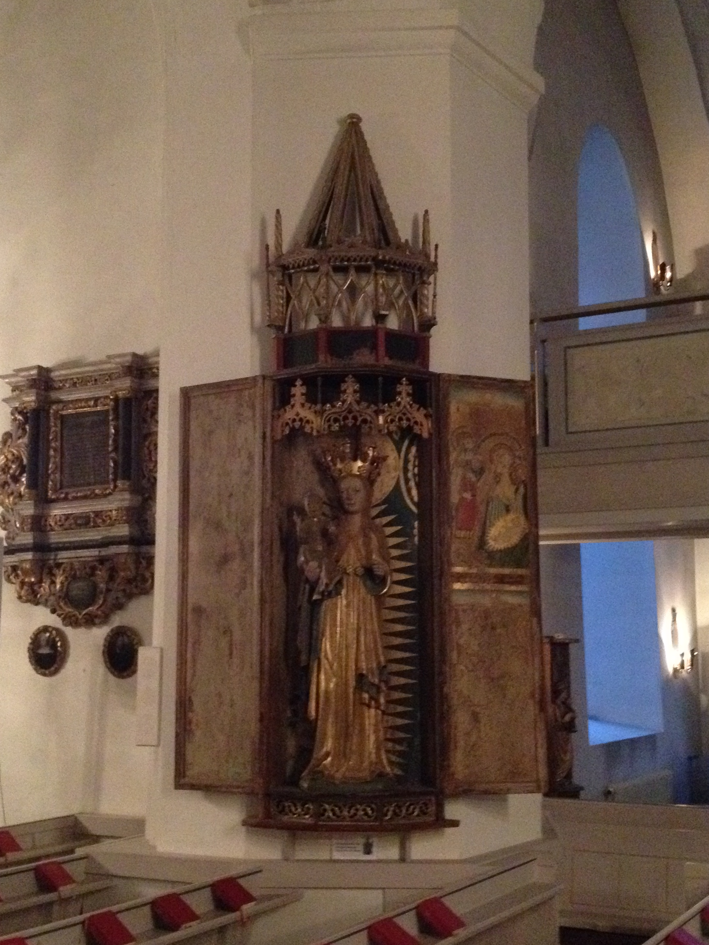 Maria-altarskåpet kallas vanligen "Bollnäsmadonnan", från omkring 1520.